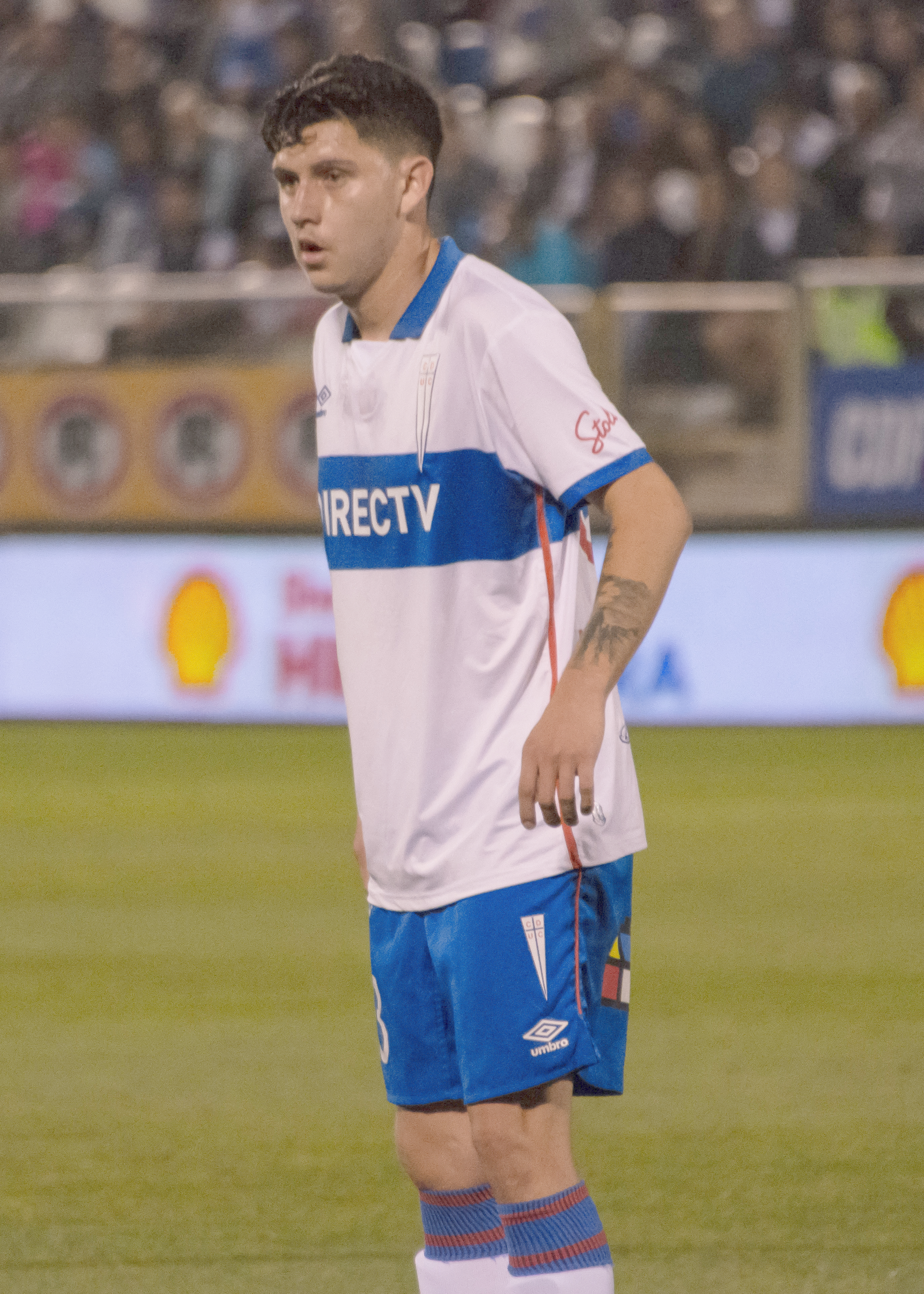 Universidad Católica v Huachipato, Estadio San Carlos de Apoquindo, Las Condes, Santiago, Chile.